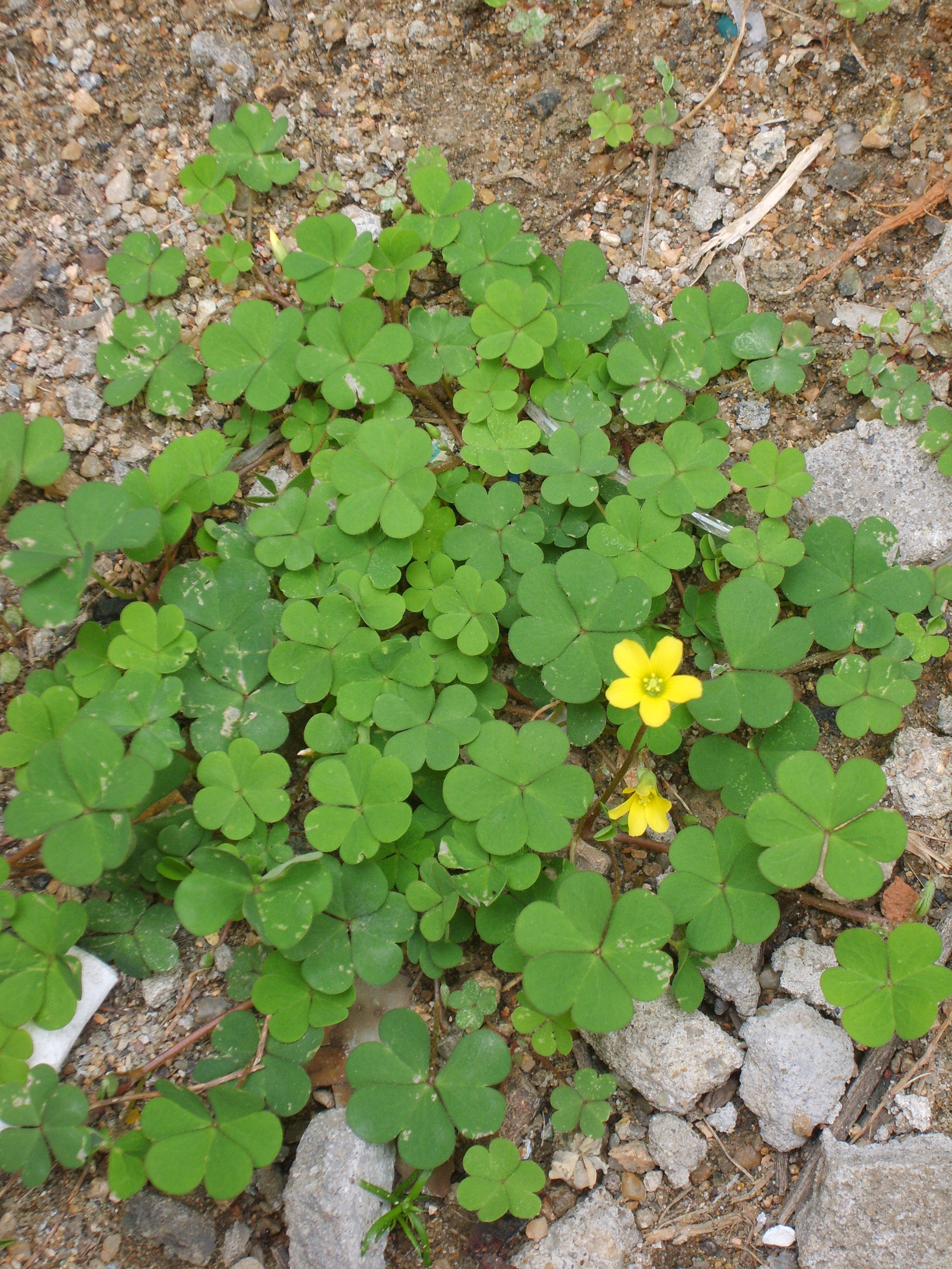 Oxalis corniculata in Bupyung, Korea. 부평 주택가에서 찍은 괭이밥